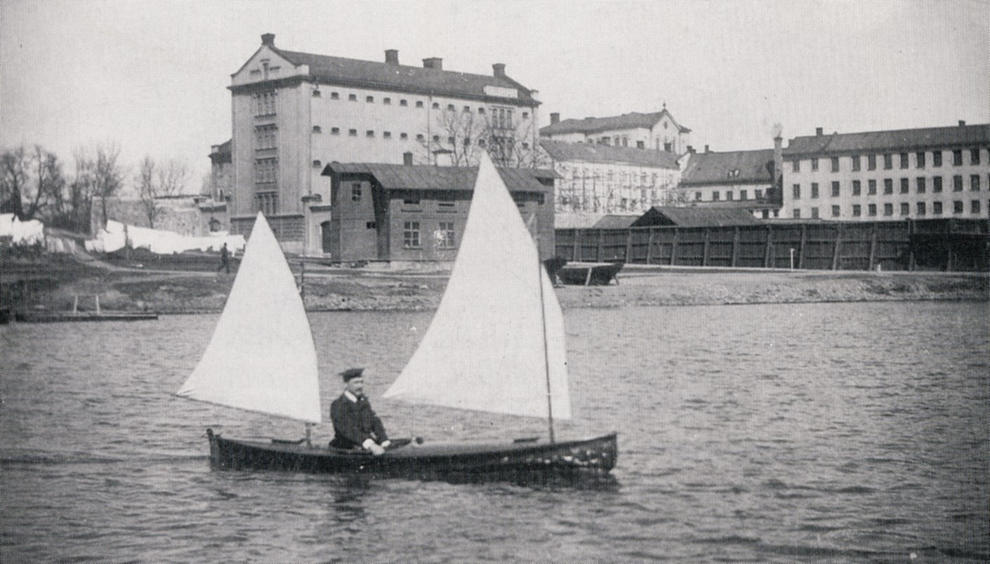 Centralfängelset på Långholmen. Fr.v. Kronohäktet, sjukhuset och spinnhuset, längs fran till vänster tvättstugan med tvätt på tork